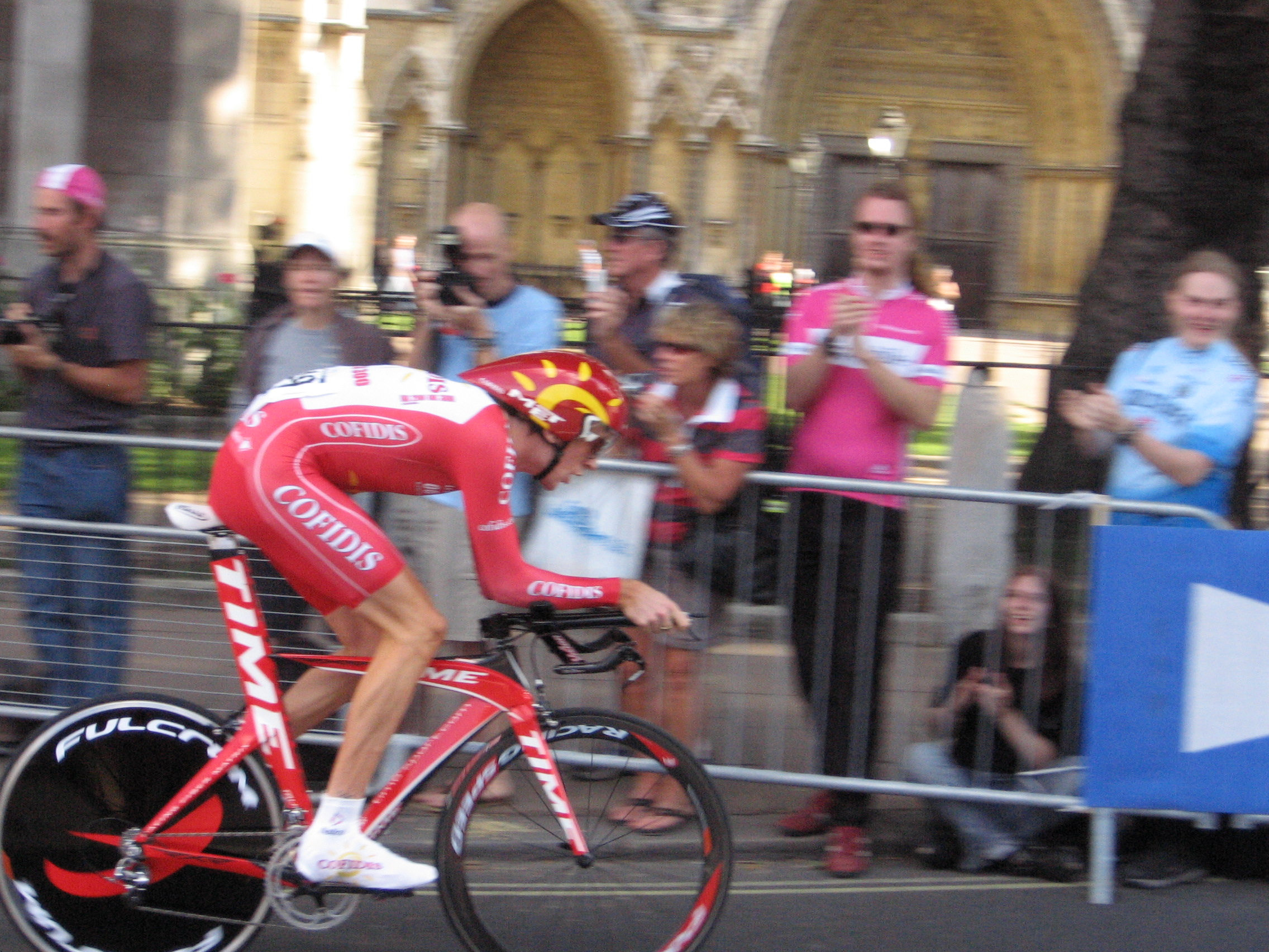 Bradley Wiggins - Prologue Tour de France 2007